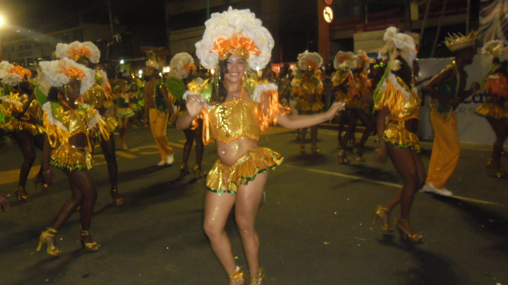 GRES Mocidade de Vicente de Carvalho